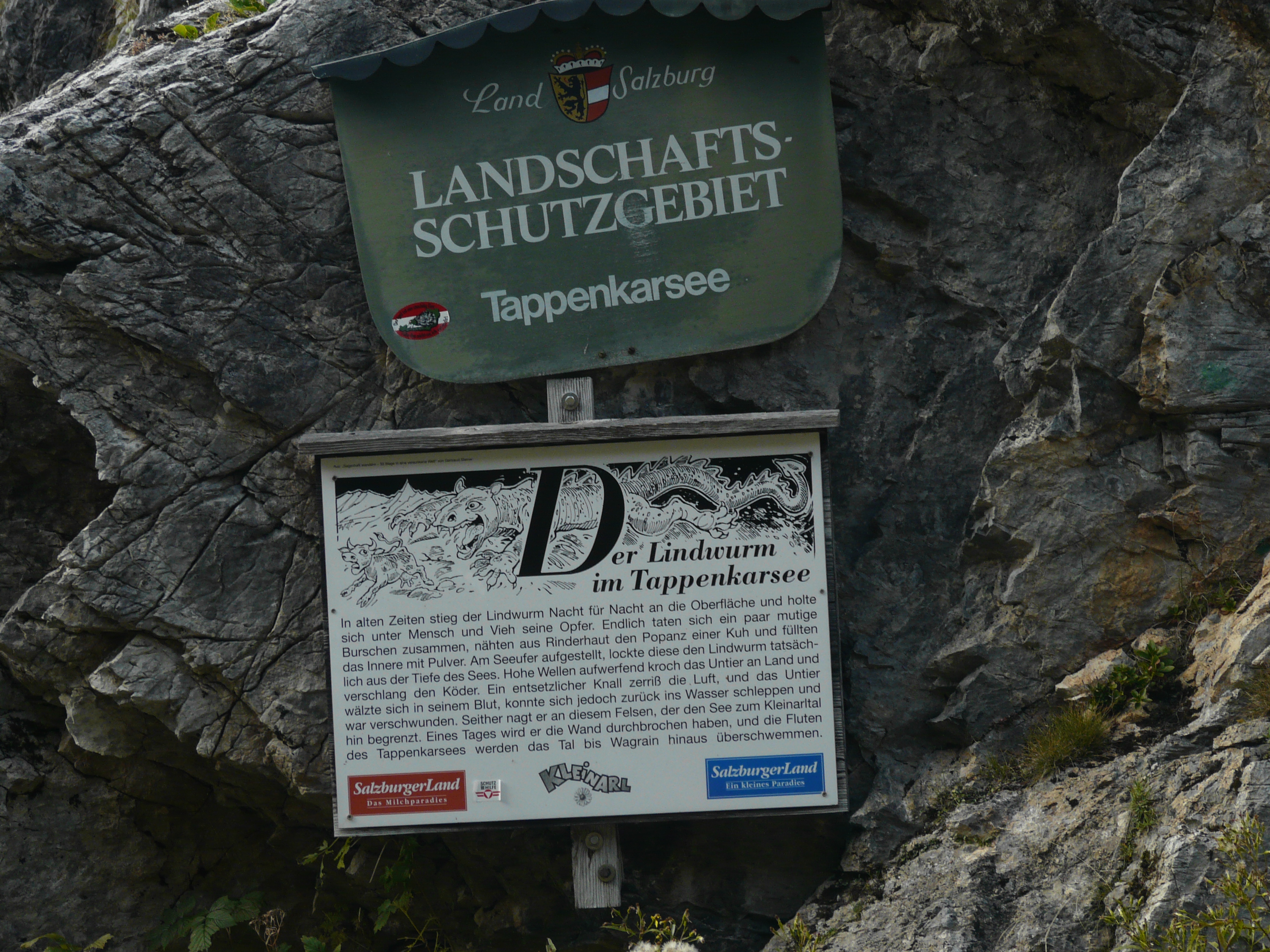 Infotafeln zum Landschaftsschutzgebiet Tappenkarsee und der Sage vom Lindwurm